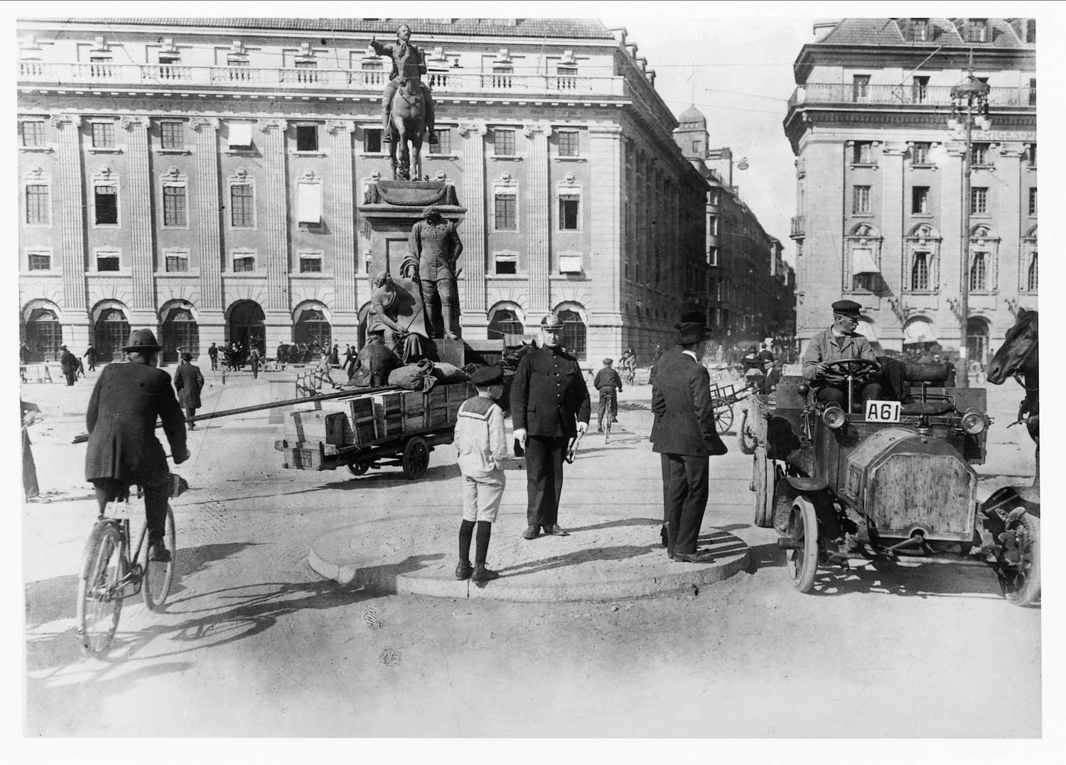 depicted place: Stockholm, Gustav Adolfs torg (Sverige (SE))